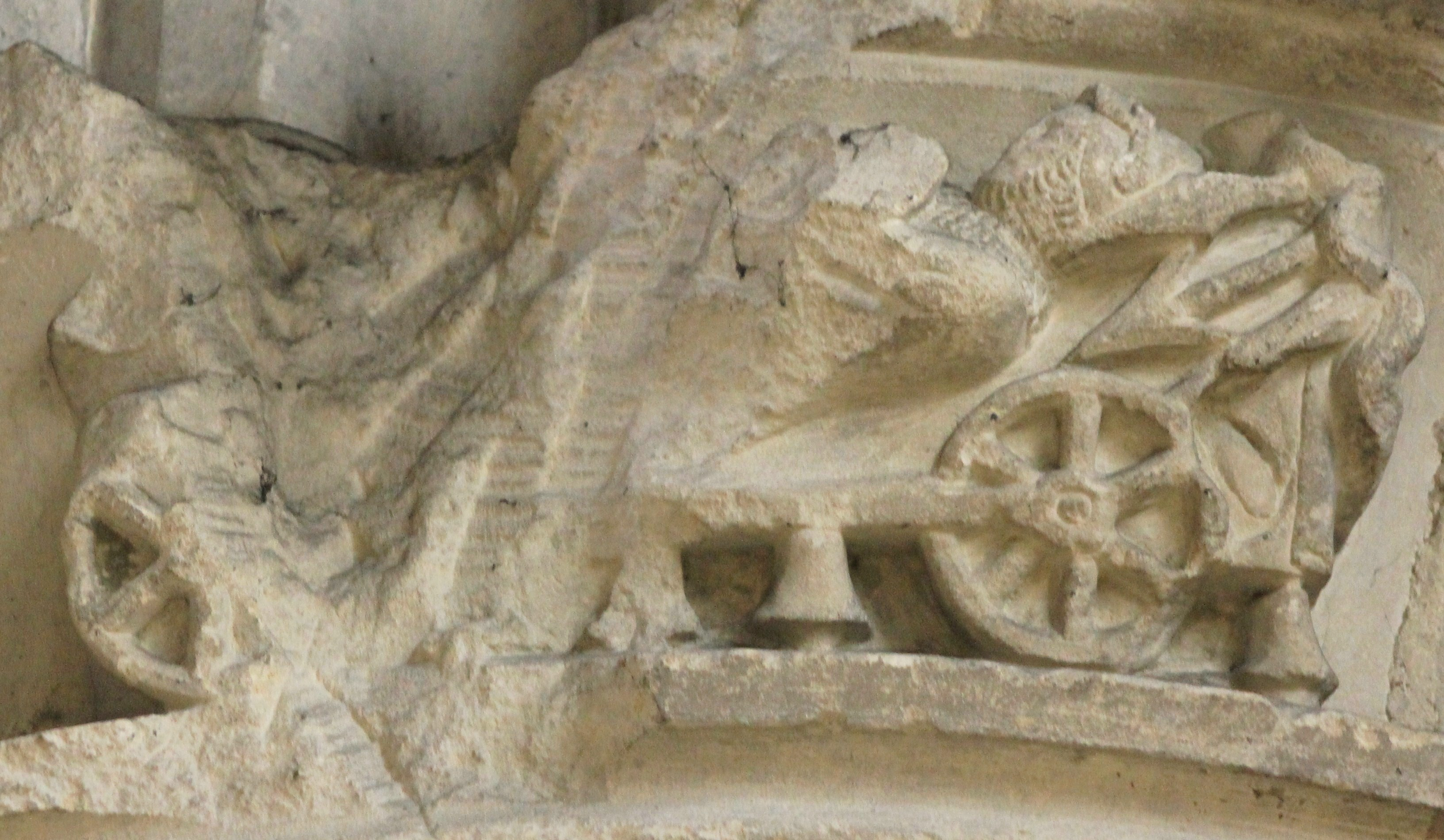 Chapiteau de la nef représentant le chevalier Gauvain au lit de la Merveille (roue, flèche et clochette), épisode du roman de Parzival, dans l'église Saint-Pierre à Caen (Calvados) Base Mémoire